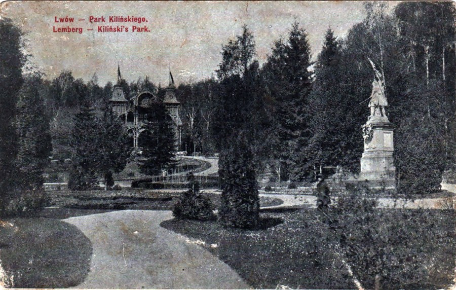 поштівка з зображенням Стрийського (колийній - імені Яна Кілінського) парку у Львові